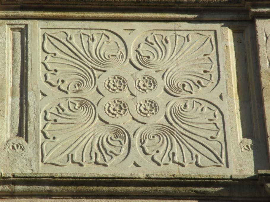 Große Akanthusrosette am alten Rathaus in Luxemburg Stadt am Krautmarkt (Palais Grand-ducal)